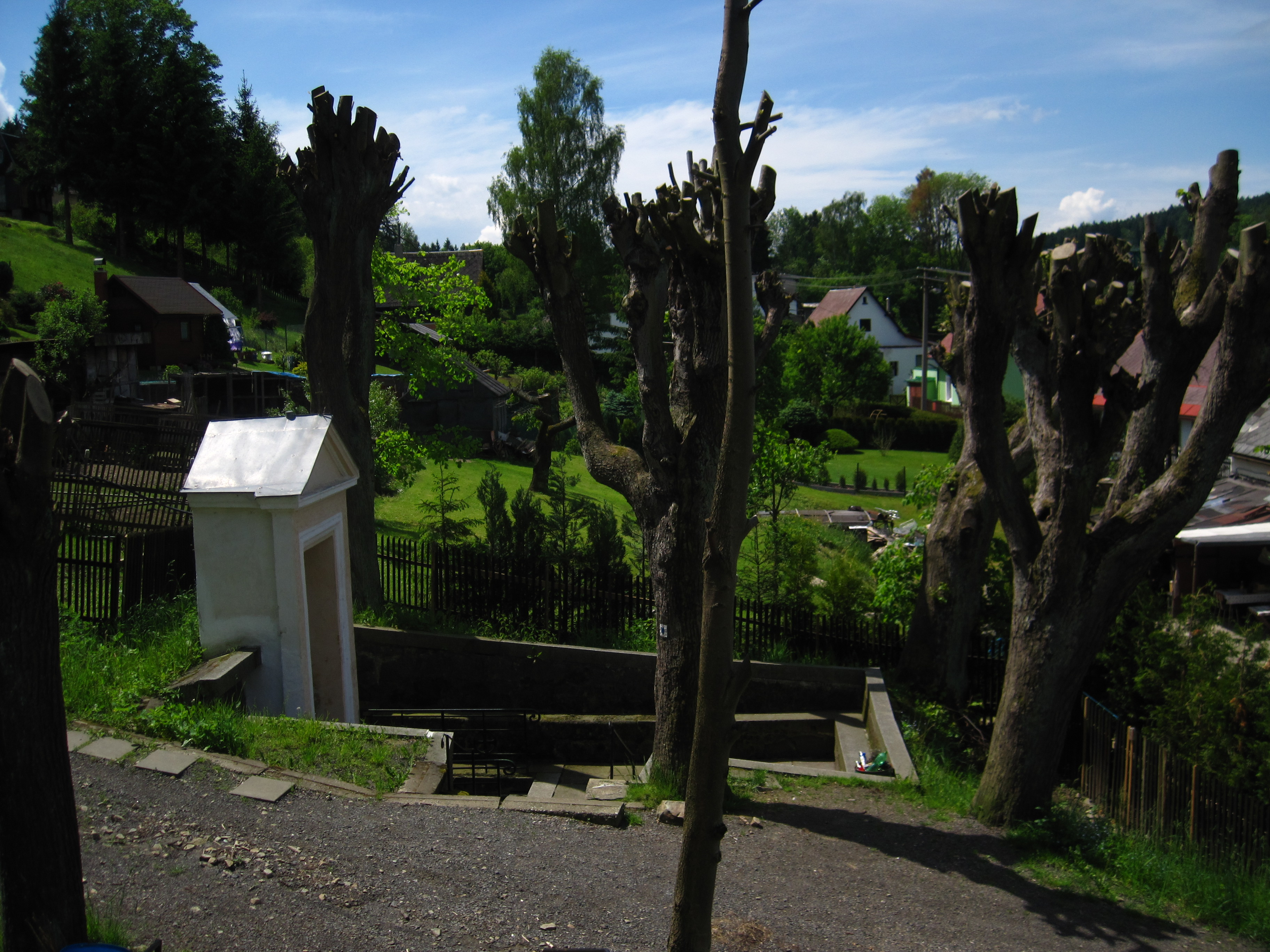 Kostel Zvěstování Panny Marie, Vilémov (okres Děčín).